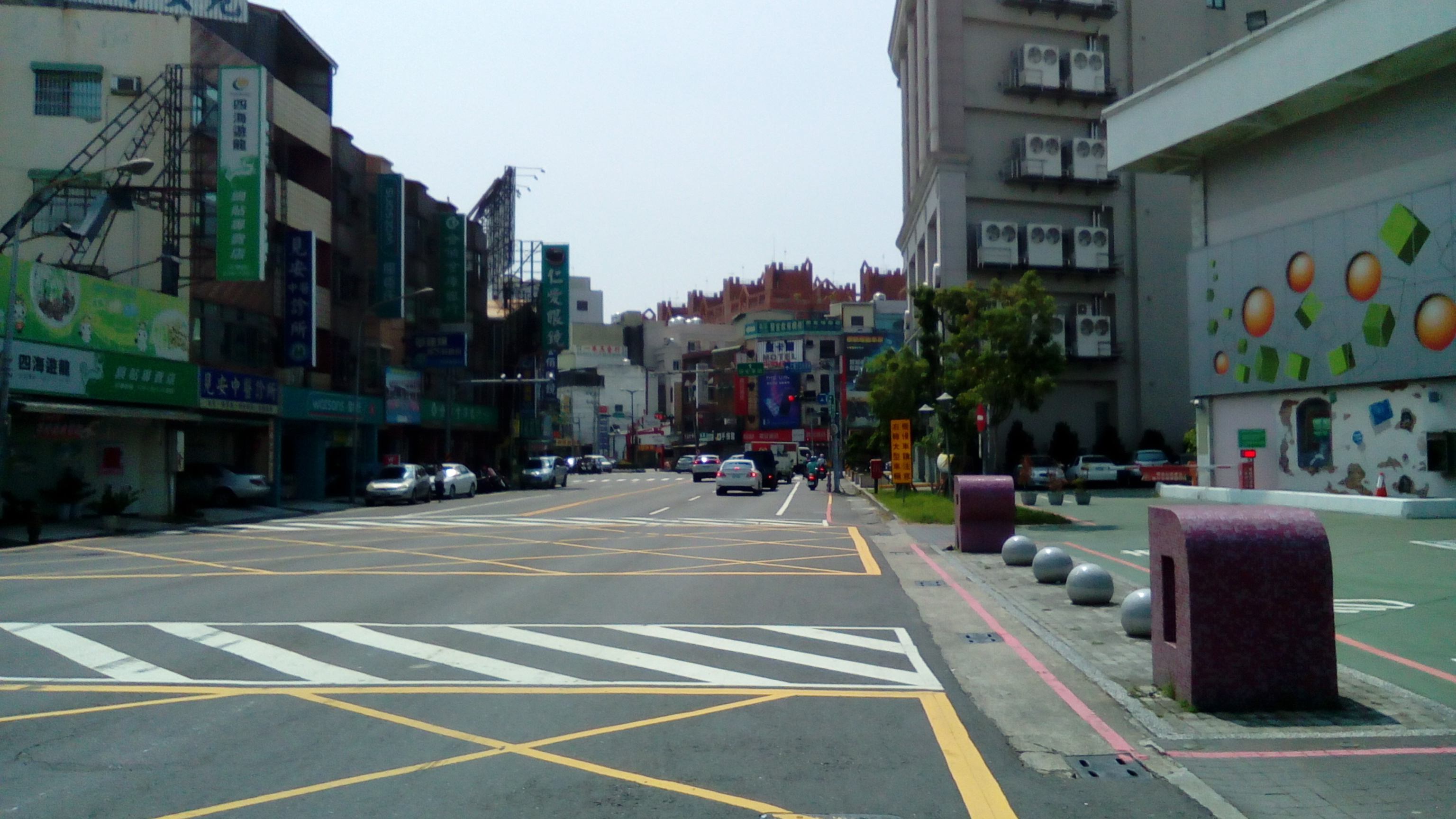 區公所前 147鄉道上